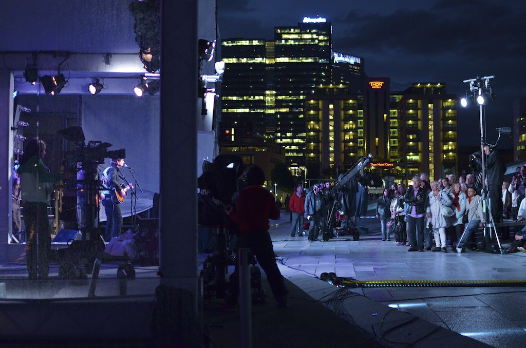 Musikkinnslag under Sommeråpent i 2011.